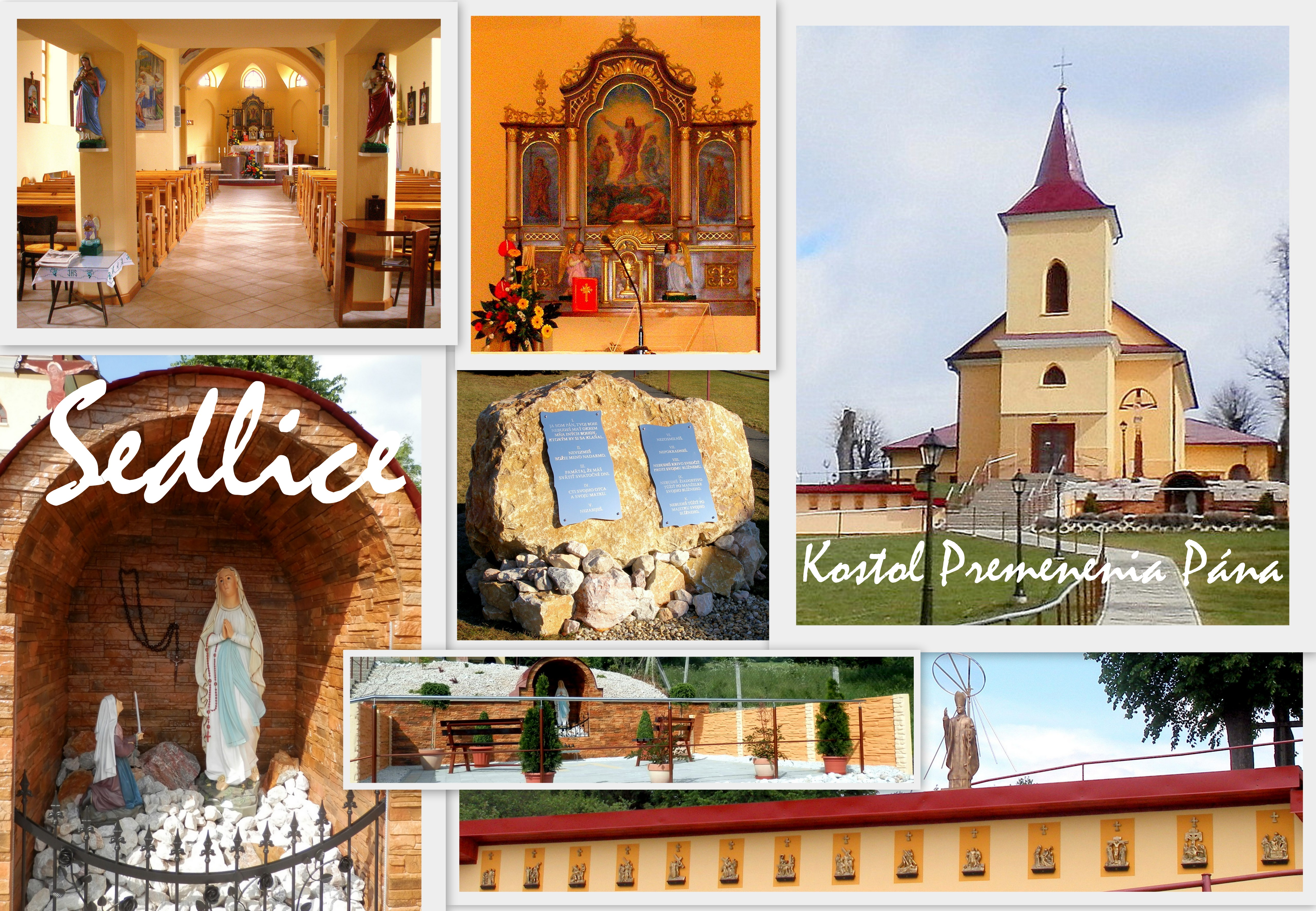 Koláž fotografií z kostola Premenenia Pána. Obec Sedlice, okres Prešov.